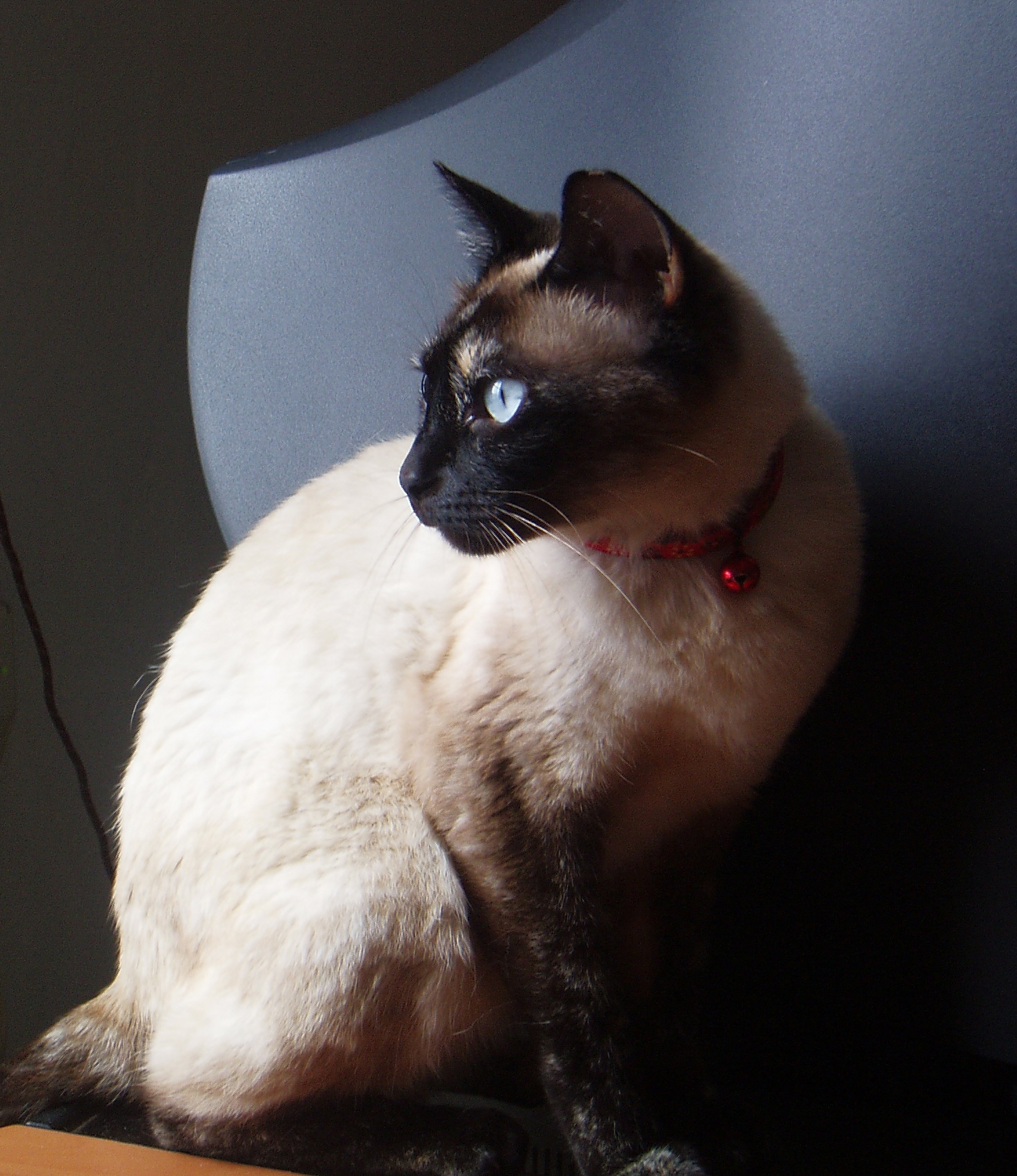 es igual que la otra foto pero no se ve mi casa de fondo jeje